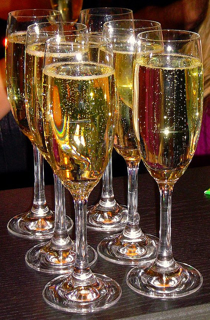 German sparkling Sekt wine